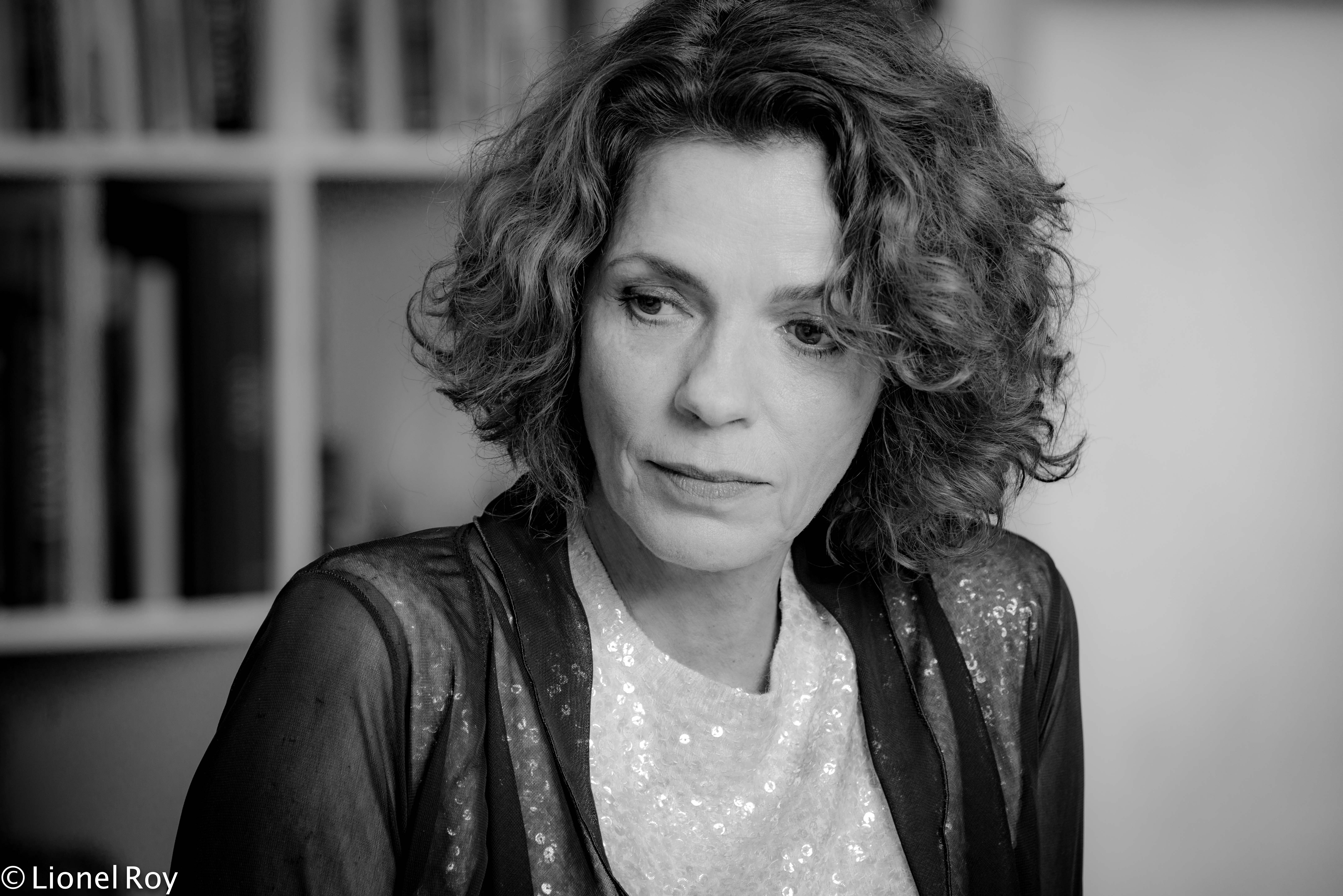 Elizabeth Bourgine by Lionel Roy © 2016 - Studio portrait . Paris